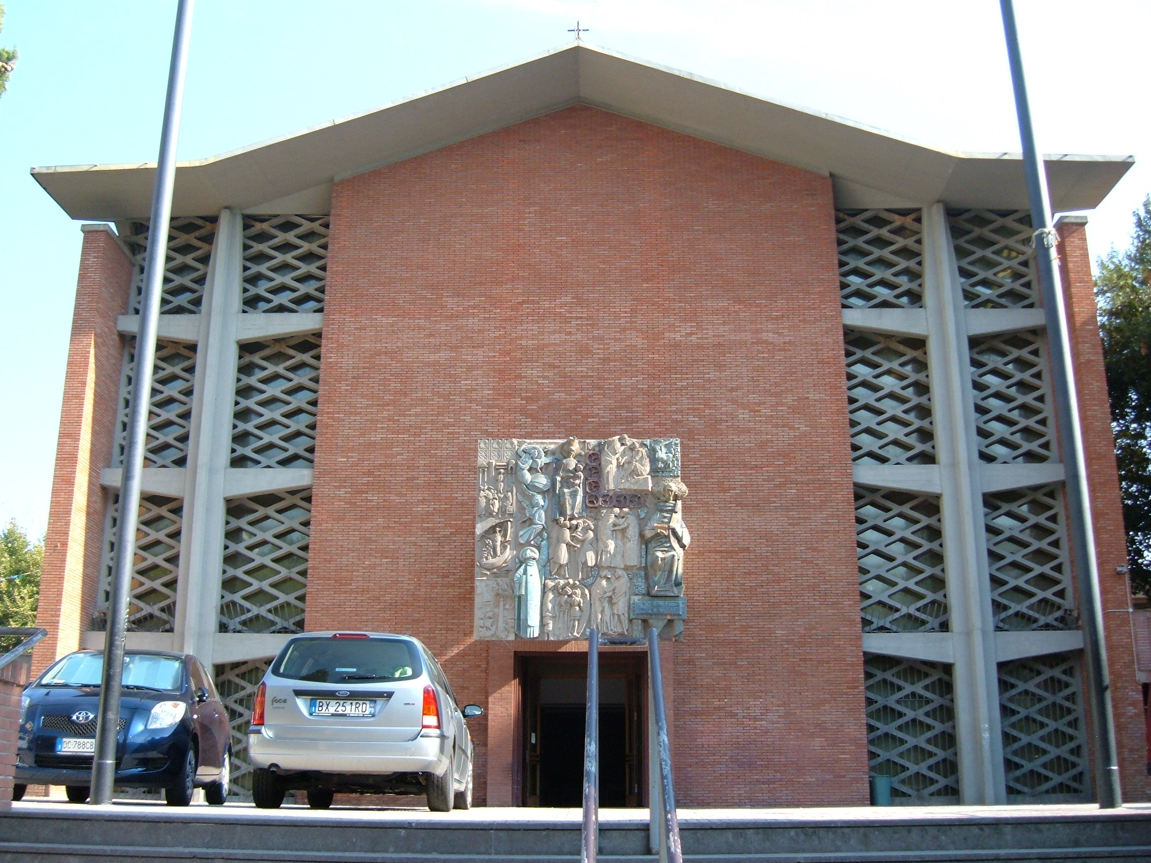 Chiesa di San Luca evangelista, a Roma, nel quartiere Prenestino-Labicano.